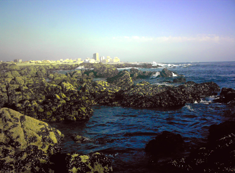 Penedos (formação rochosa) repletos de mexilhões. Cidade da Póvoa de Varzim visível ao fundo.